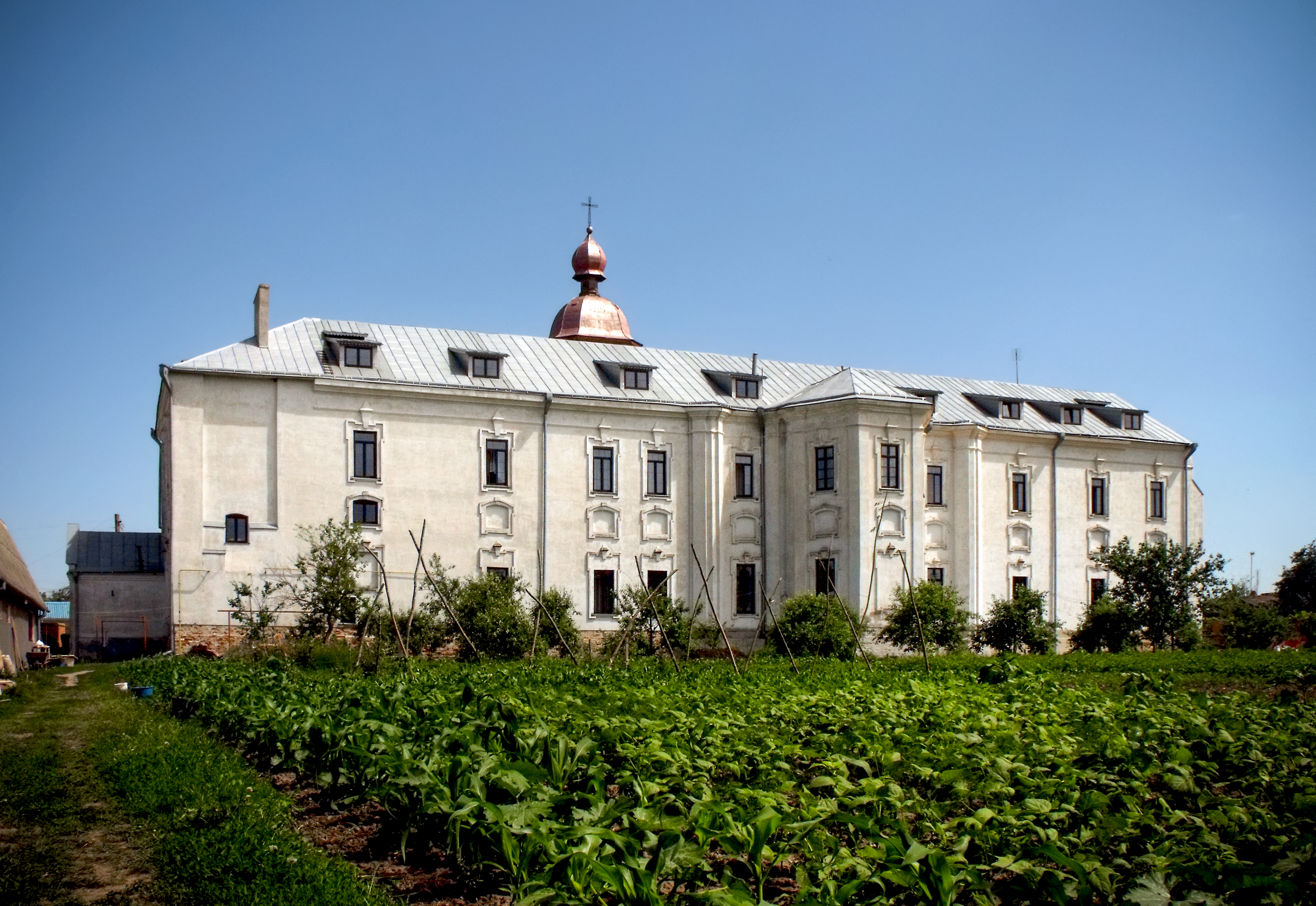 Кармелітський монастир (Покровська церква з келіями): Вінницька область, місто Бар, вул. Монастирська,55